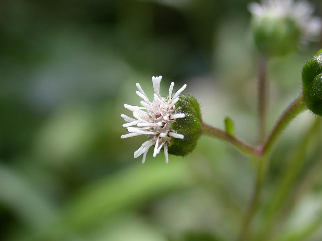 Adenostemma lavenia：ヌマダイコン 2006/10/15 和歌山県田辺市：Tanabe City. Wakayama pref. Japan